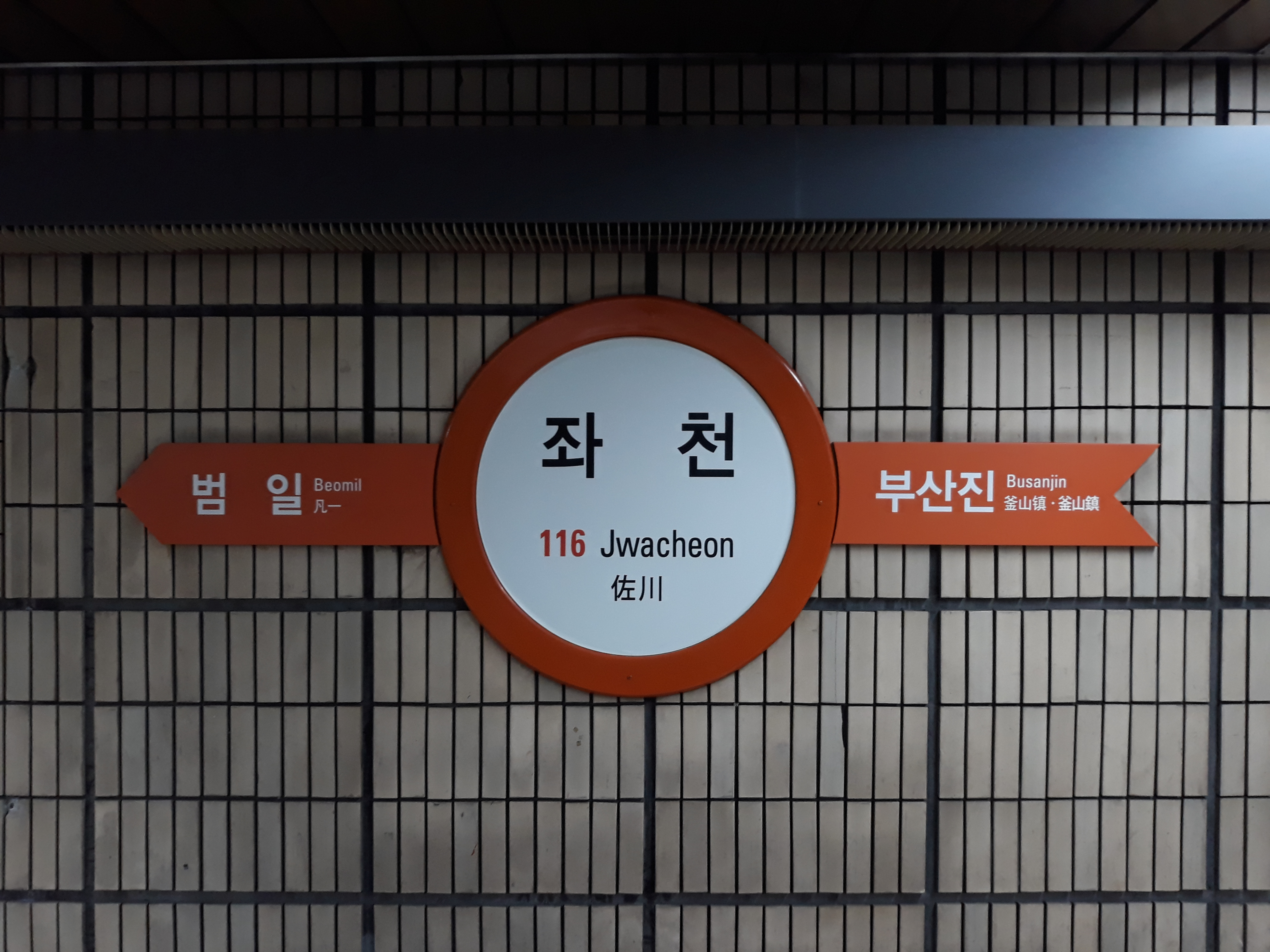 부산 도시철도 1호선 좌천역 노포 방면 역명판